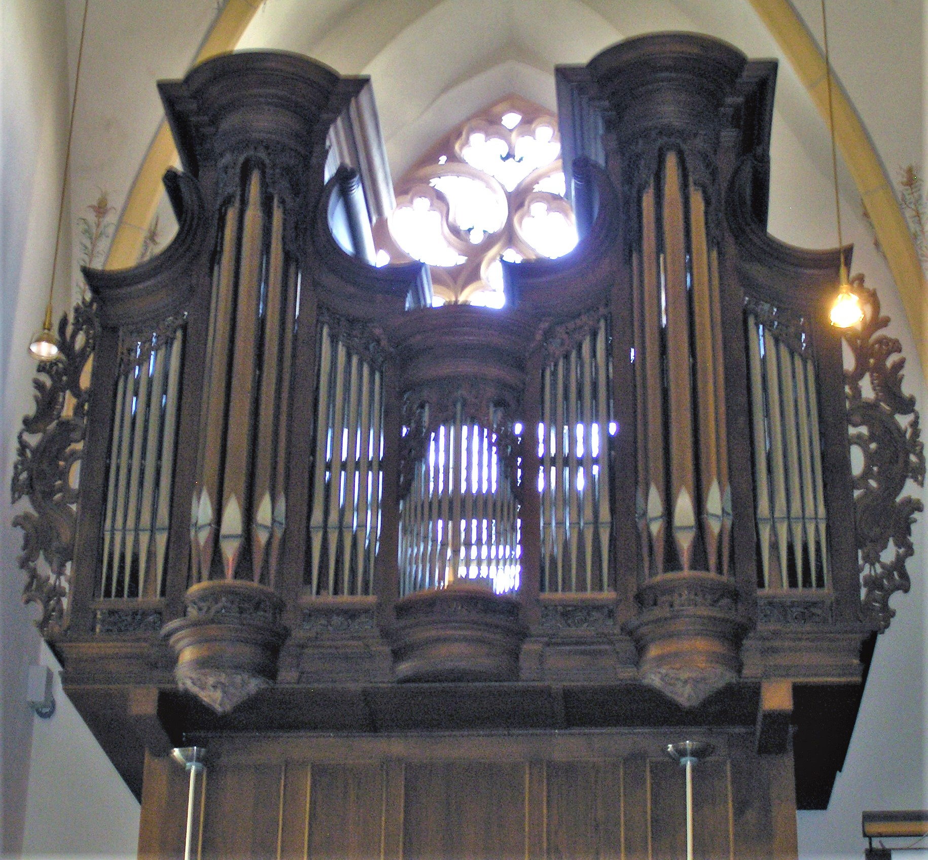 Ingelheim, Die Orgel der Burgkirche